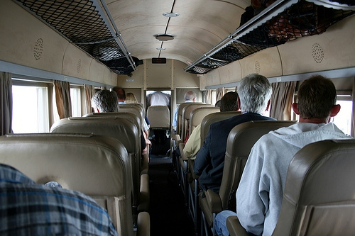 Kabine der Ju 52 D-AQUI/D-CDLH der Deutsche Lufthansa Berlin Stiftung